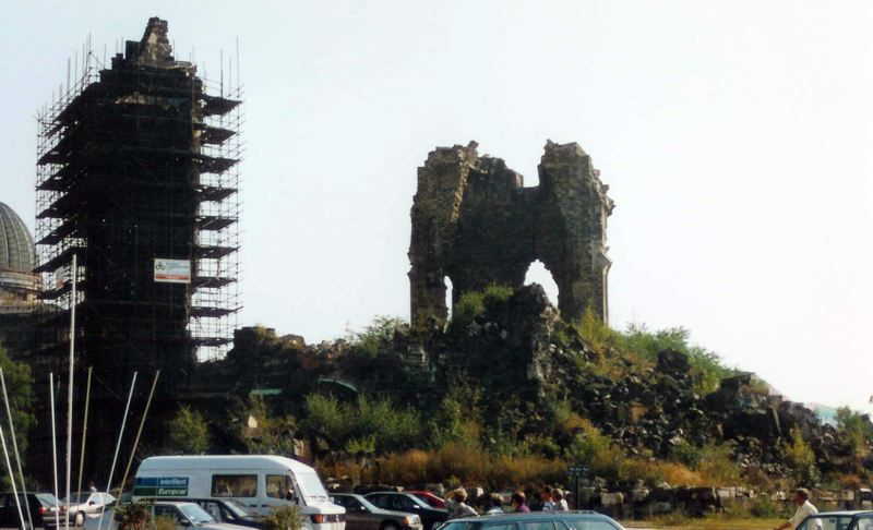 Beschreibung: Ruine der Frauenkirche in Dresden mit Gerüst . Quelle: Fotografiert im Sommer 1991 Fotograf: Heinrich Gimmler Besitzer: Als Erbmasse übergegangen an Robert Steffens Auflösung 800 x 486 Pixel Copyright Status: Public Domain Bild:1991_Dresden_Frauenkirche.jpg